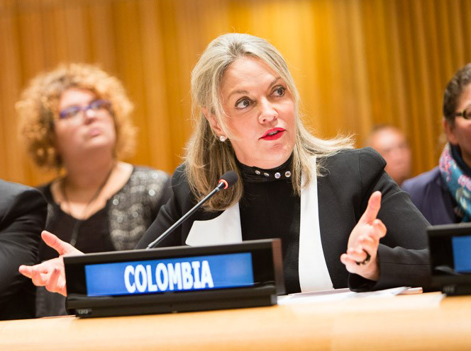 María Emma Mejía Vélez, política, periodista y diplomática colombiana.